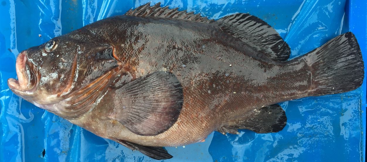 Ejemplar de mero cherne (Epinephelus acanthistius) en el puerto de Ancón, Lima, Perú.